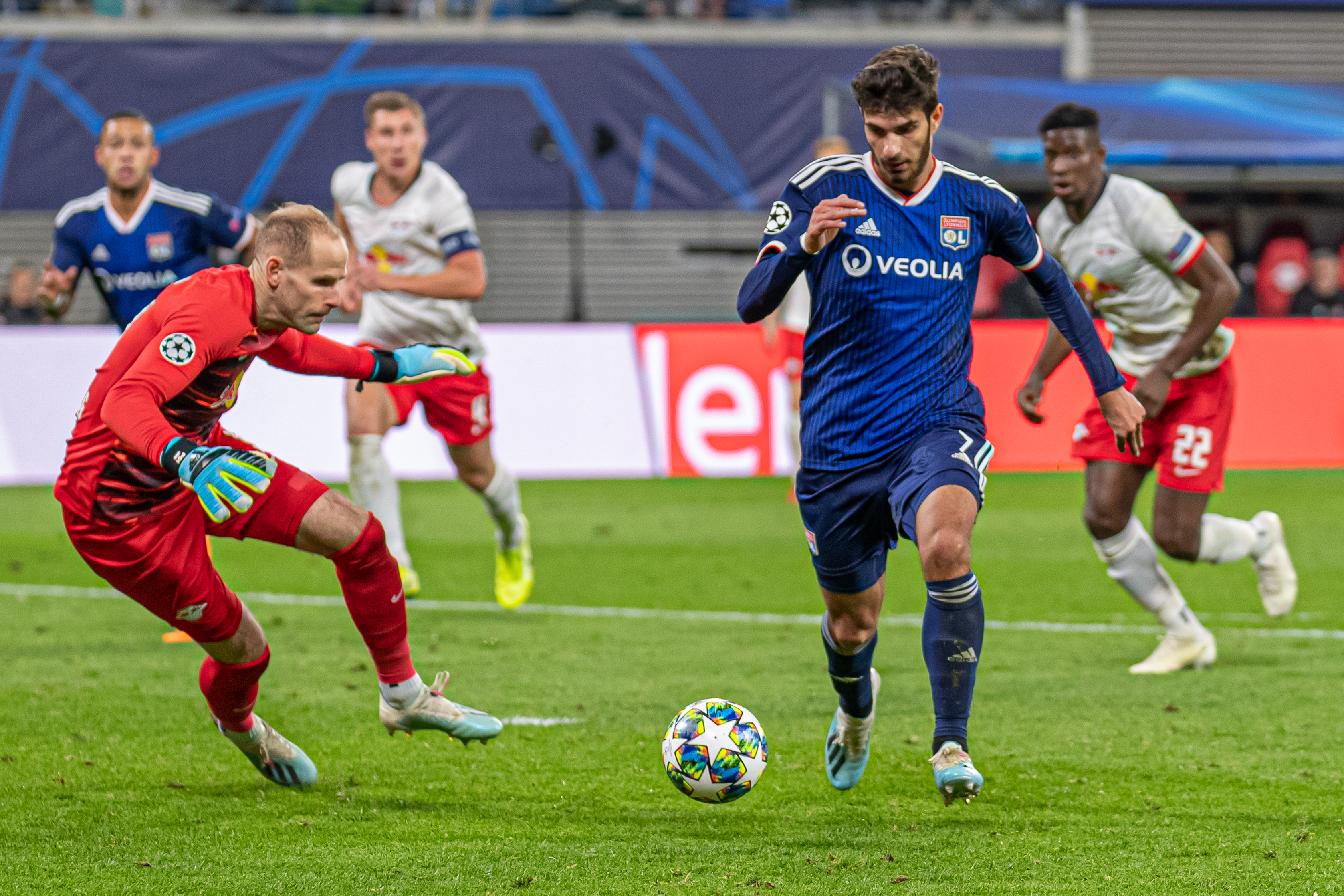 Fußball, Männer, UEFA Champions League, RB Leipzig - Olympique Lyonnais; v.li.: Peter Gulacsi (RB Leipzig, 32, Torwart, goalkeeper) macht im Duell gegen Martin Terrier (Olympique Lyonnais, 7) keine gute Figur; Tor zum 0:2, goal, Torerfolg, Aktion